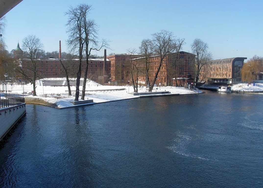 Młyny Rothera na Wyspie Młyńskiej w Bydgoszczy